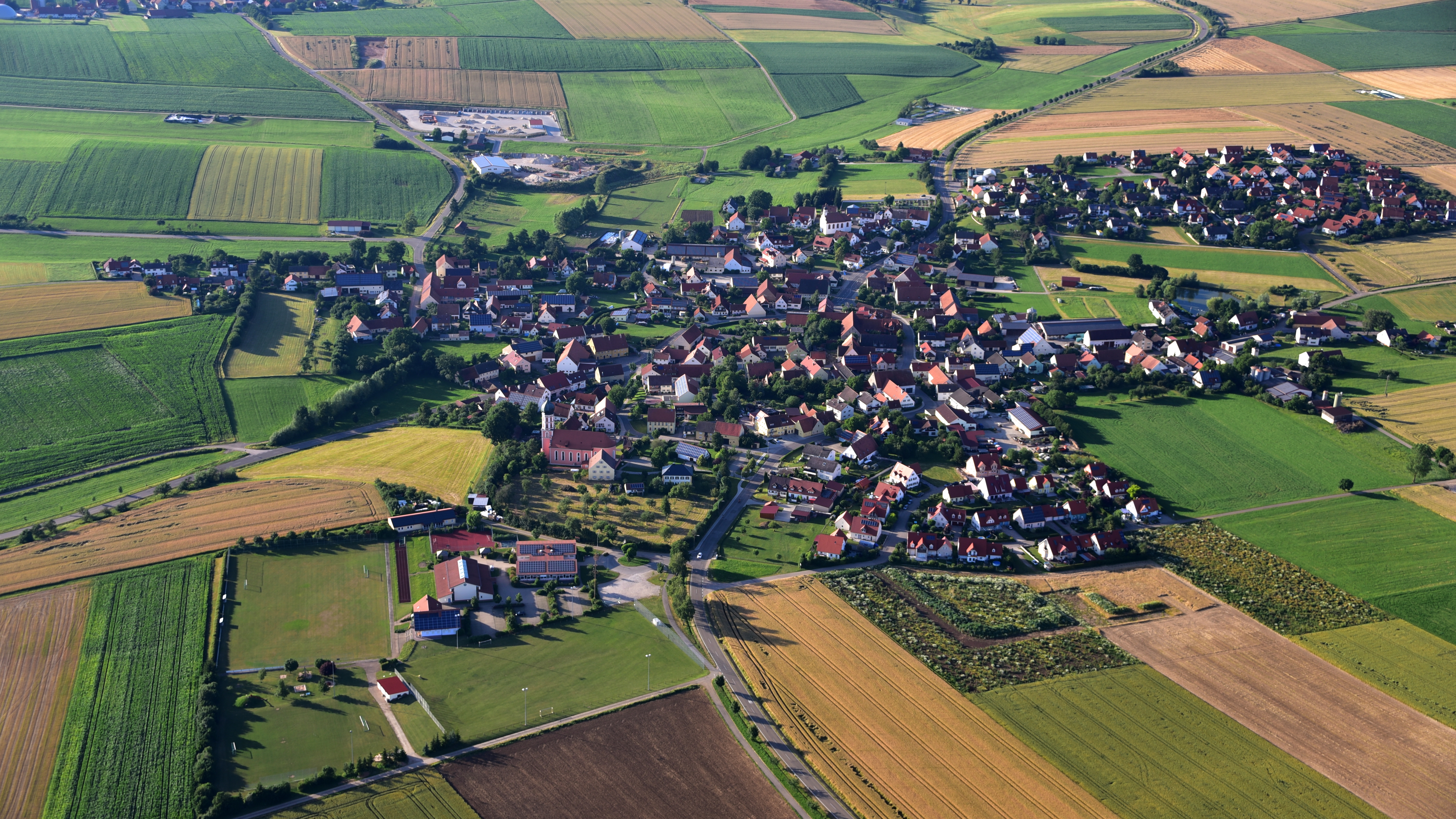 Gnotzheim, Luftaufnahme (2016)